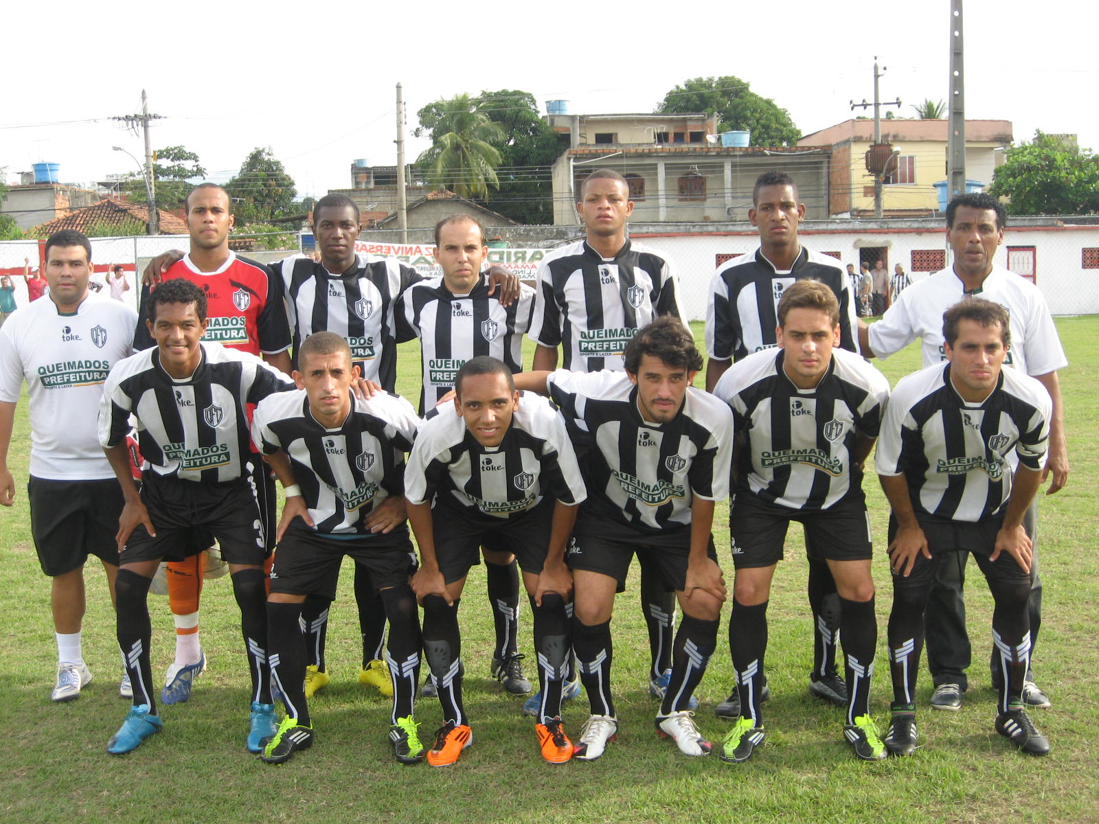 Equipe profissional do Queimados Futebol Clube em 2011.